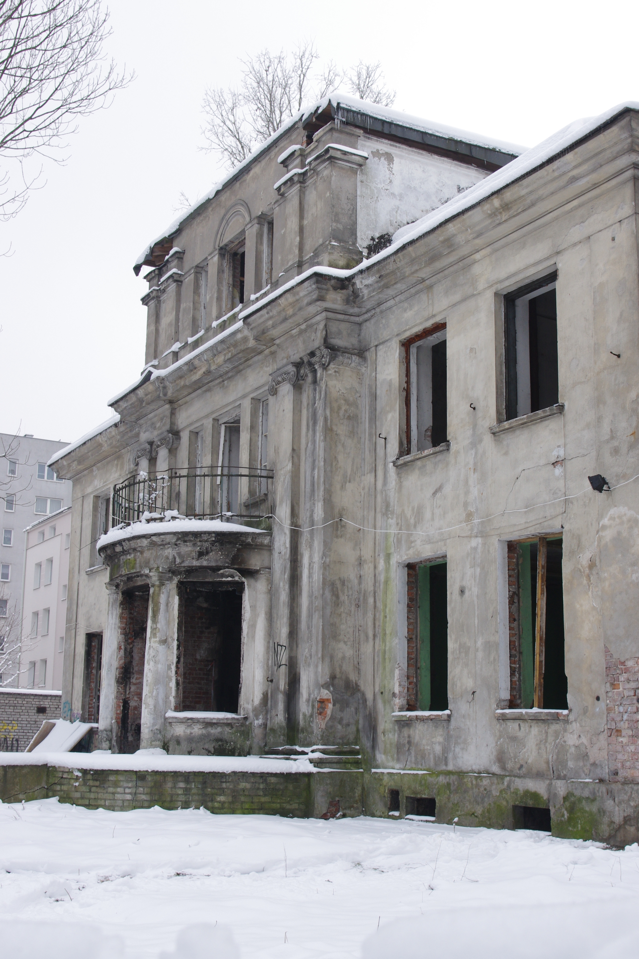 Willa przemysłowca kuśnierskiego Arpada Chowańczaka (Arpad Chowańczak) przy ul. Morskie Oko 5 w Warszawie – powstała w 1928 r., położona na warszawskim Starym Mokotowie. Od 2010 r., w rejestrze zabytków.